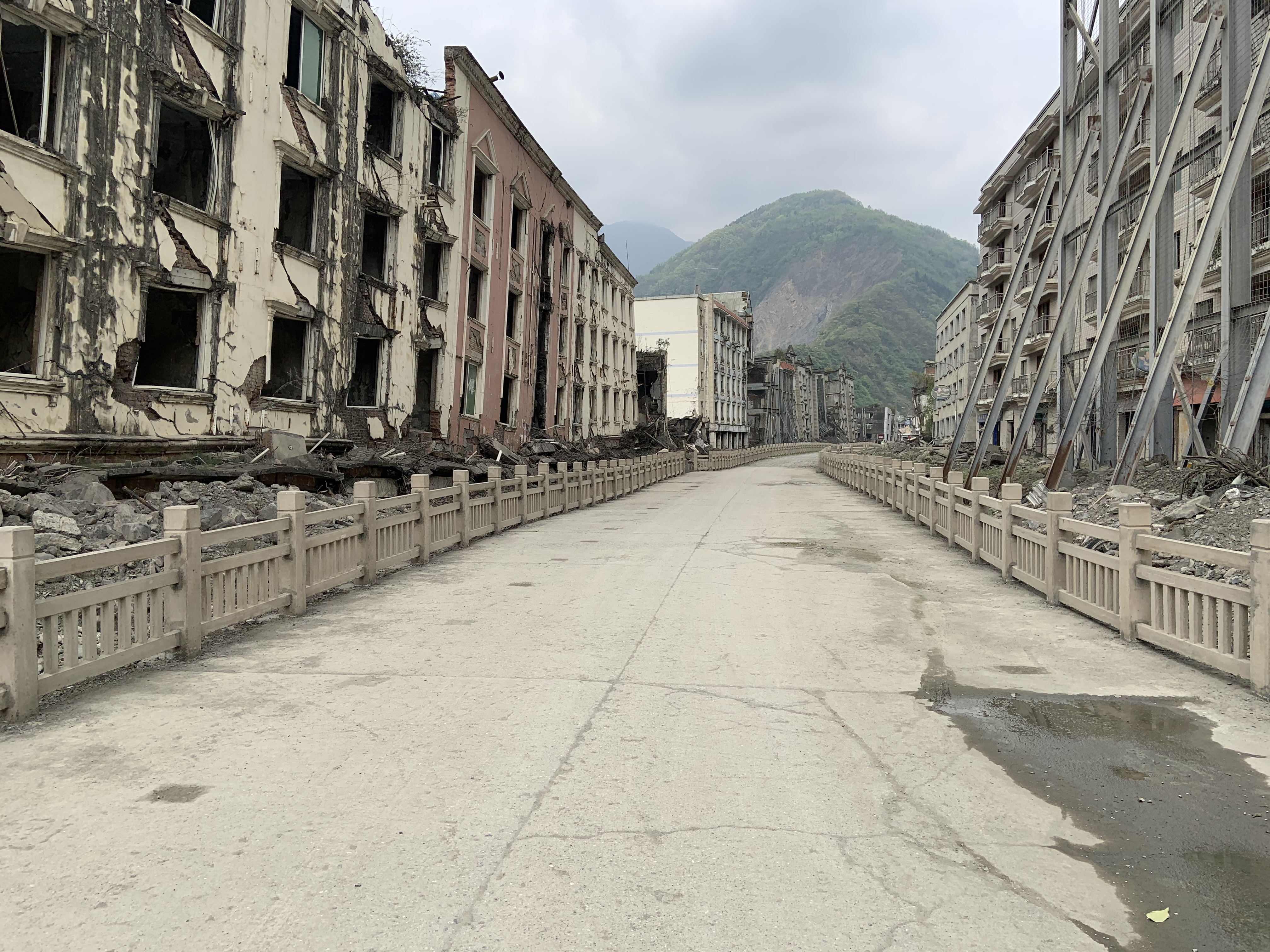 北川老县城地震遗址-新城区倾斜变形的房屋